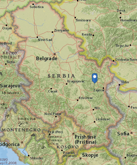 Географски положај пећине